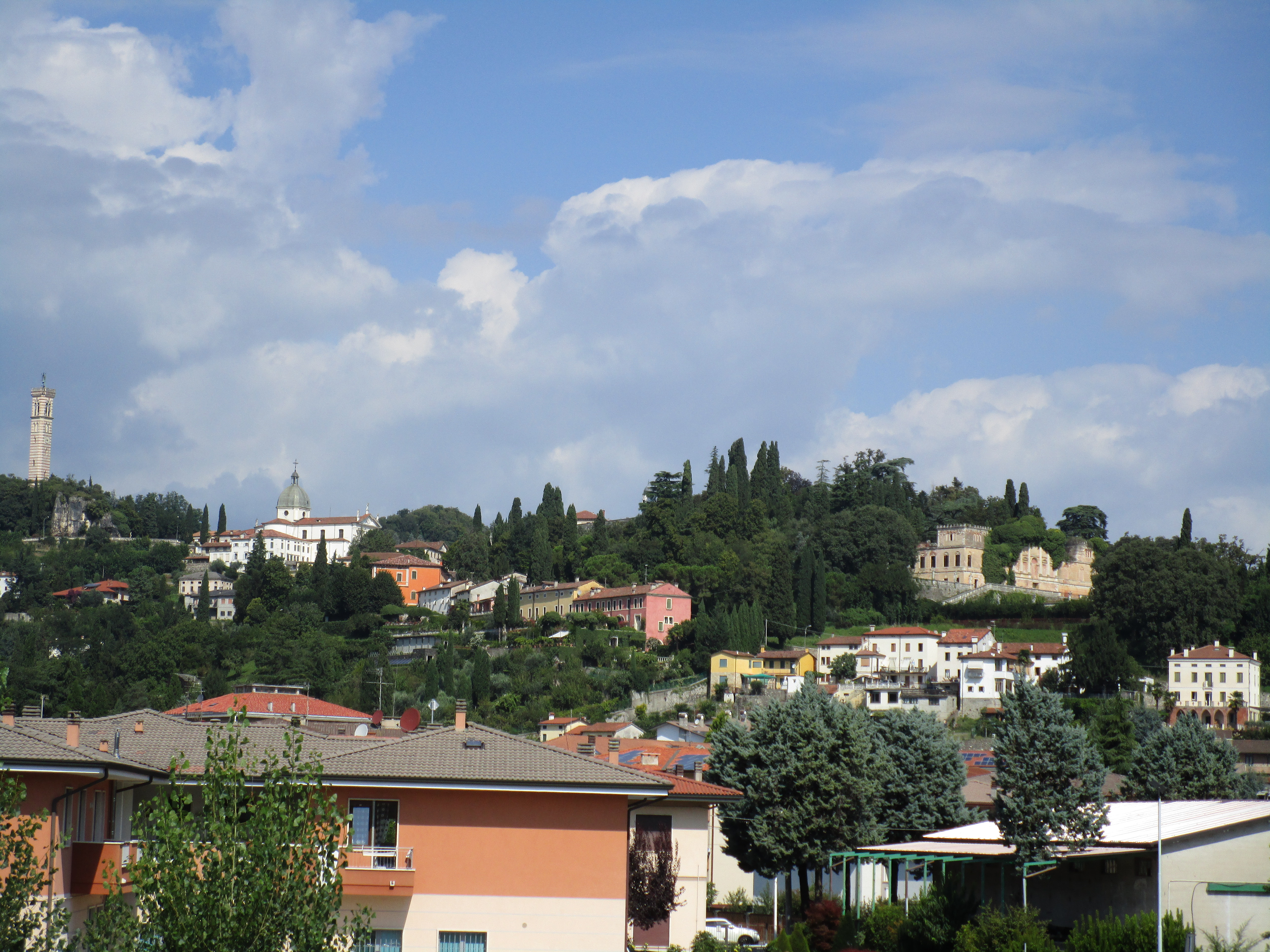 Veduta della parte collinare (Chiesa e Ville) di Trissino